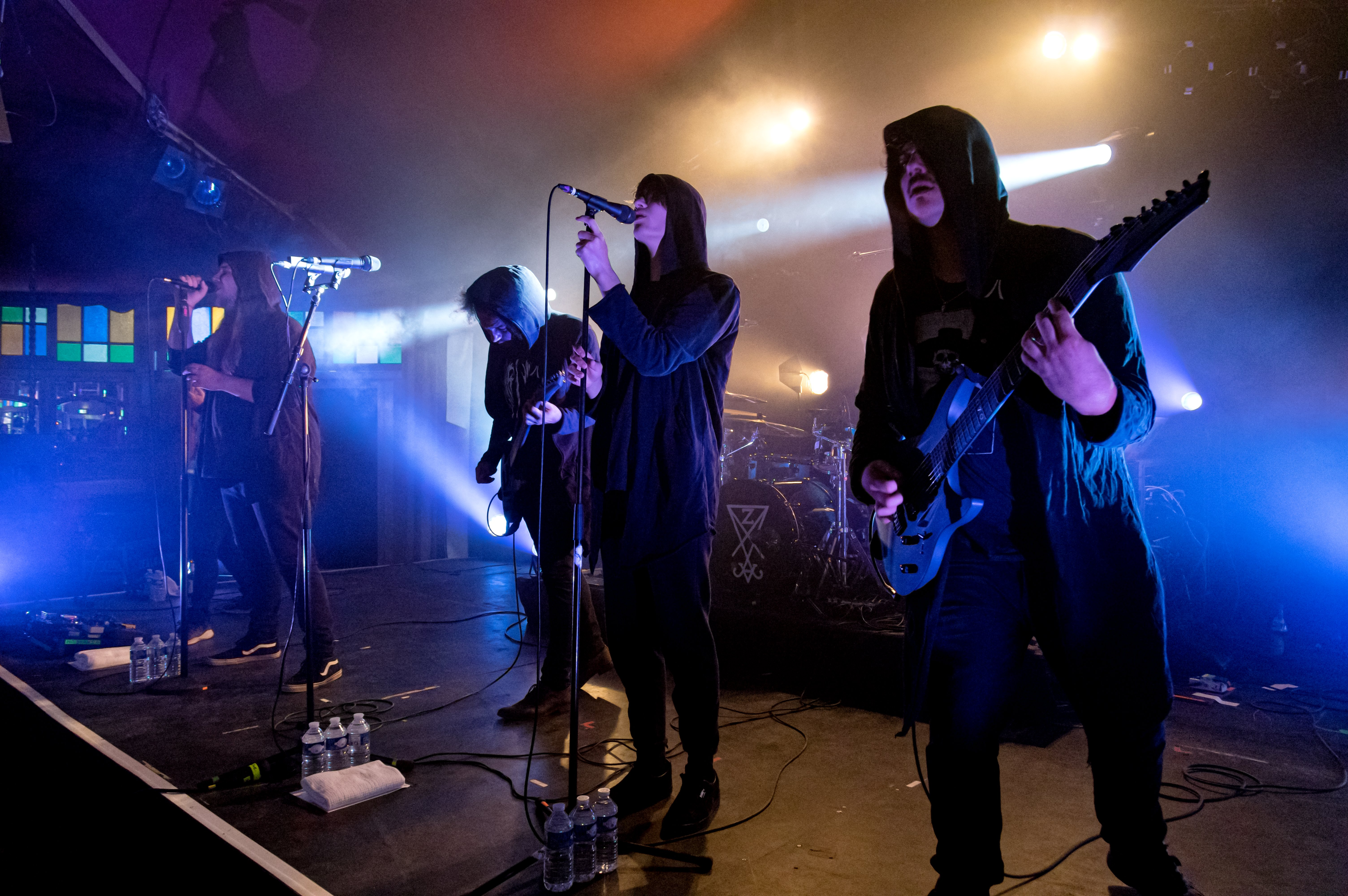 Bilder vom Zelt Musik Festival 2019 in Freiburg im Breisgau